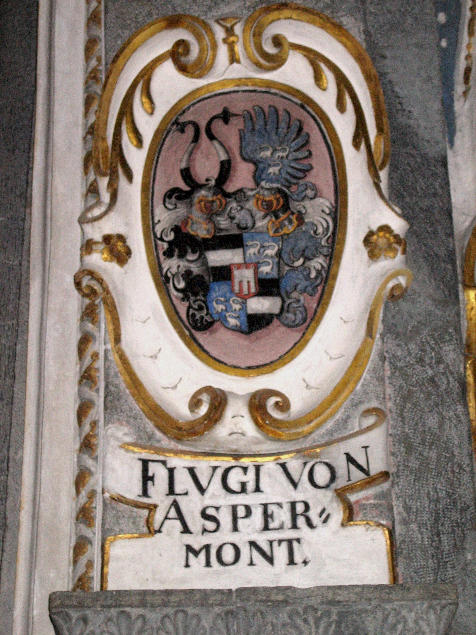 Wappen der Herren von Aspermont in der Kathedrale von Chur